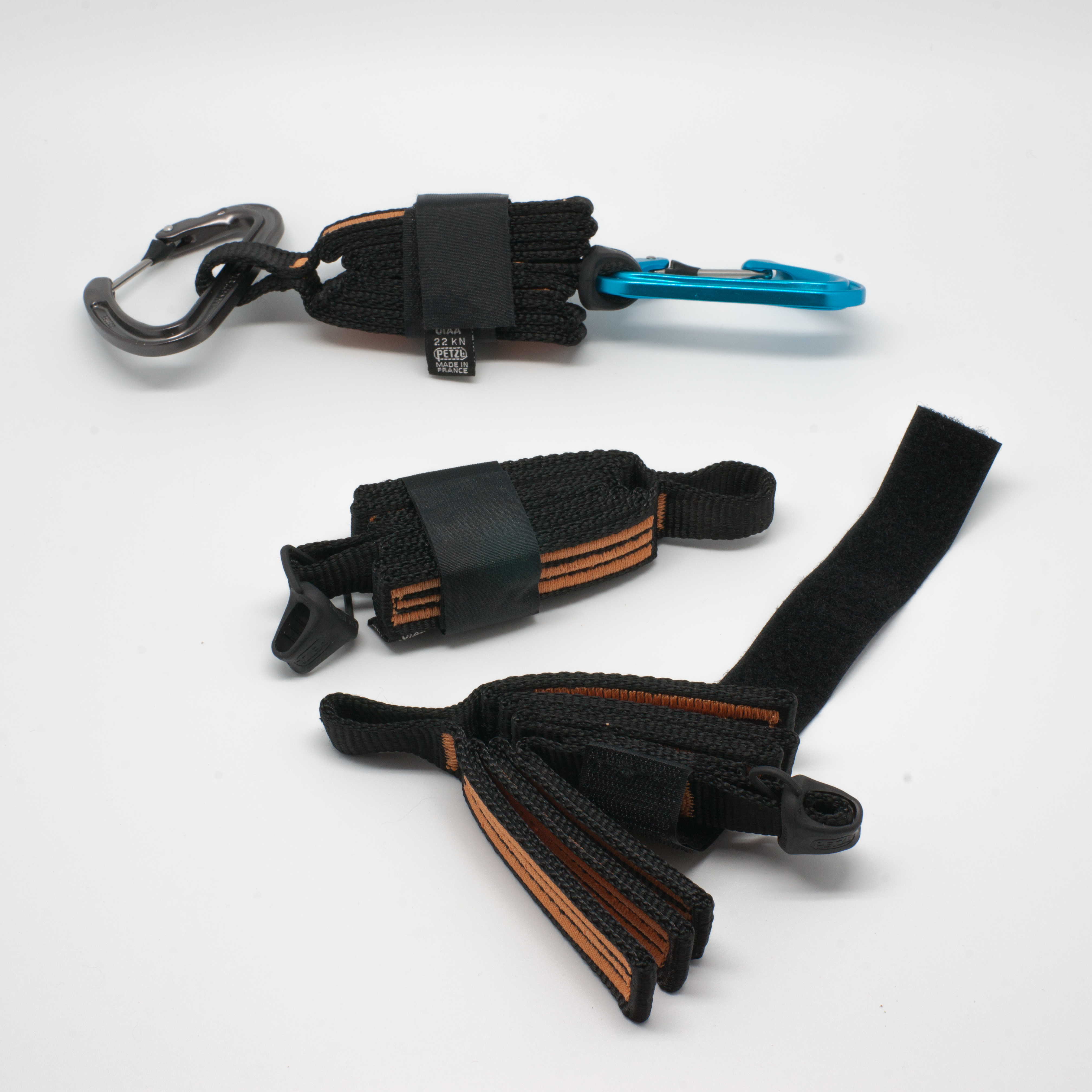 Matériel d'escalade - studio WMCH - Dégaine explose